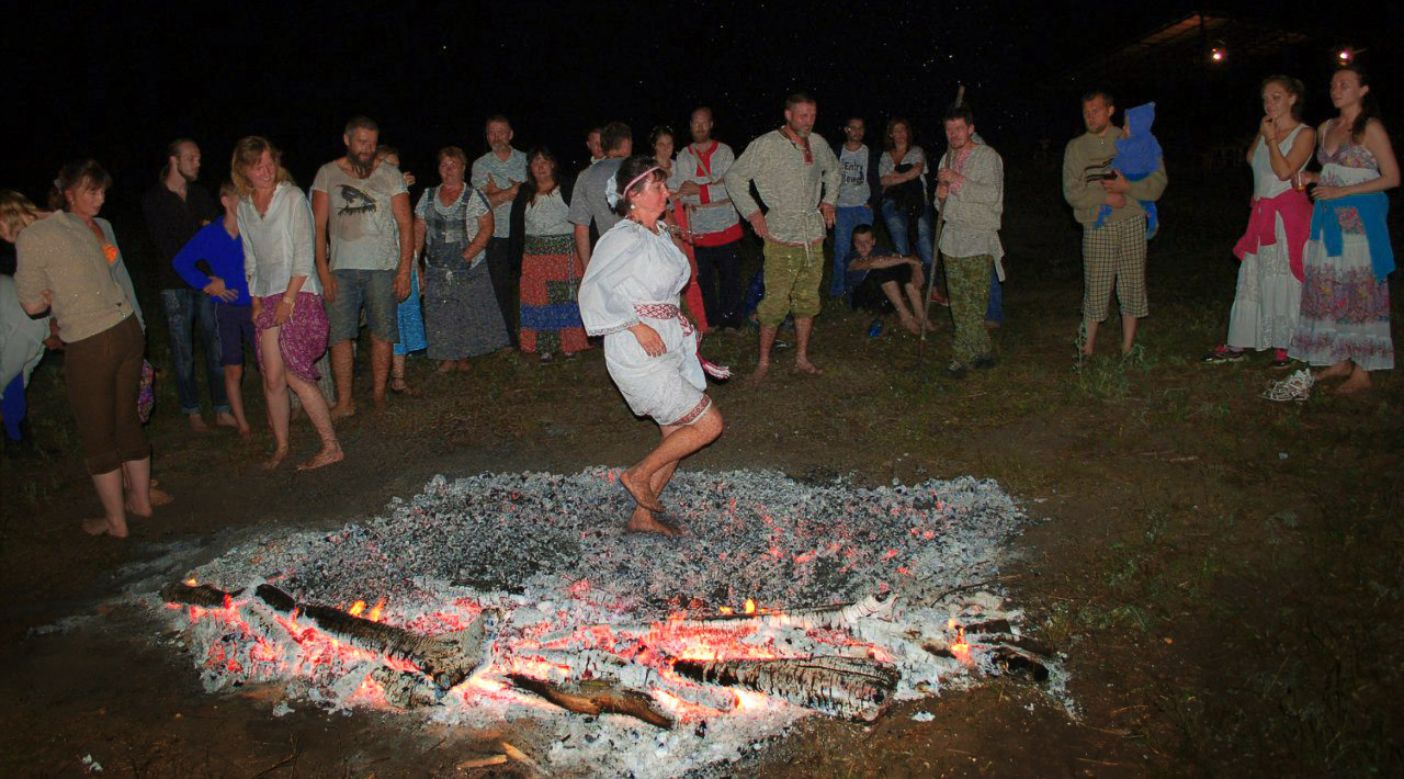 Праздник Ивана Купалы в родовом поселении «Серебряный бор», Белгородская область.